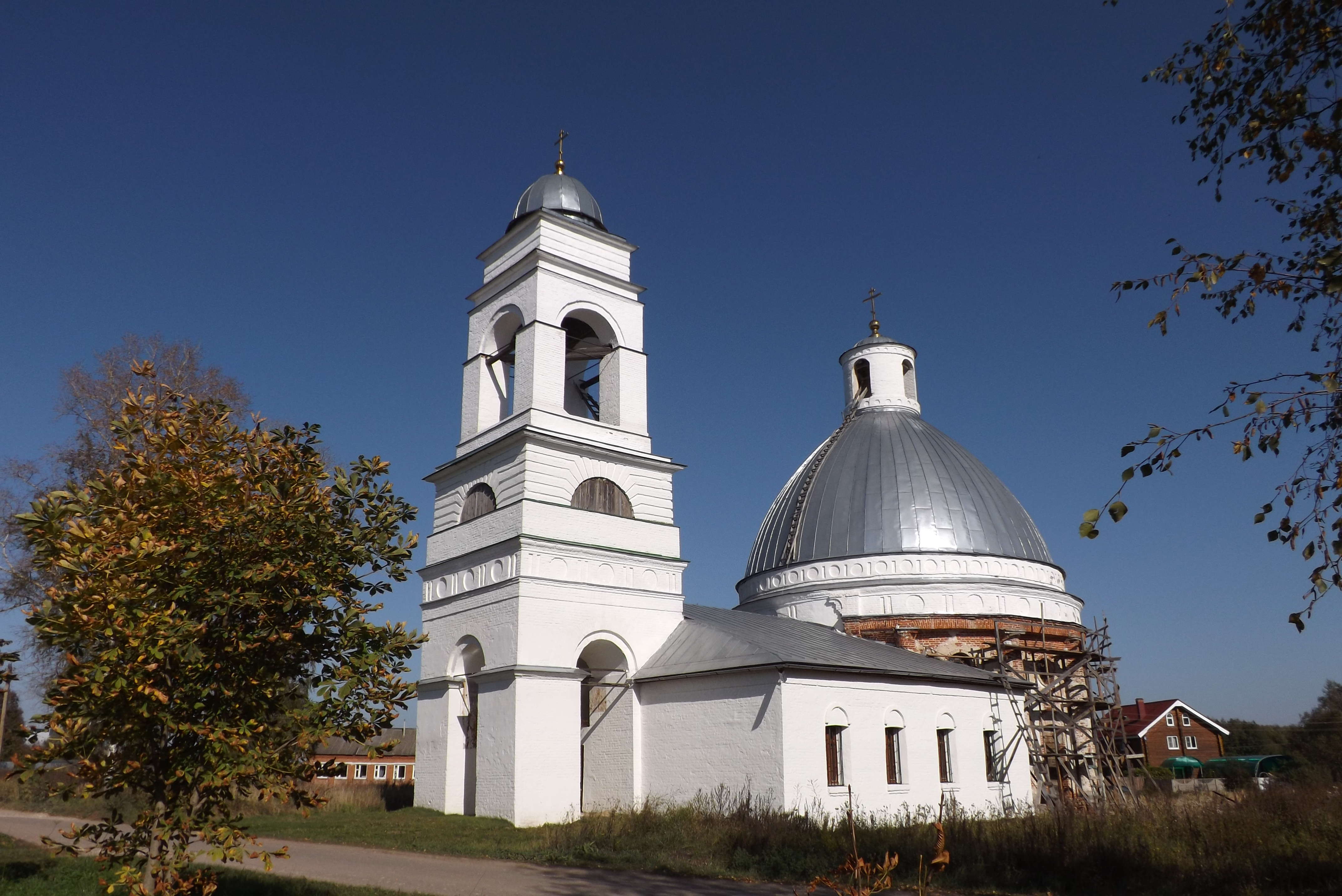 Церковь Георгиевская с колокольней: Чириково, Суздальский район, Владимирская область